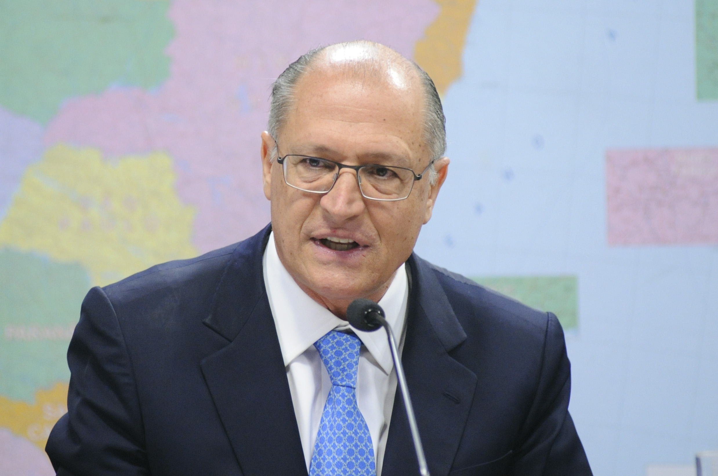 Comissão de Serviços de Infraestrutura (CI) promove audiência pública interativa para debater os desafios no abastecimento de água potável, em face da crise hídrica. Entre os convidados, o governador de São Paulo, Geraldo Alckmin. Logo após, apreciação das emendas da comissão ao PLDO de 2016. Em pronunciamento, governador de São Paulo, Geraldo Alckmin. Foto: Pedro França/Agência Senado.